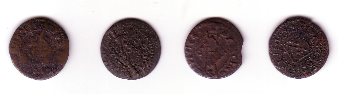 Sisens (moneda catalana) revers. Un sisè és una moneda catalana de coure encunyada durant la Guerra dels Segadors a diferents localitats de Catalunya, com Tàrrega, Girona, Solsona, Barcelona, Manresa, Sanaüja, Valls, Vic o Vilafranca del Penedès.